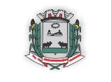 Brasao de Inocência. Simbolos oficiais do Brasil - licenca livre.